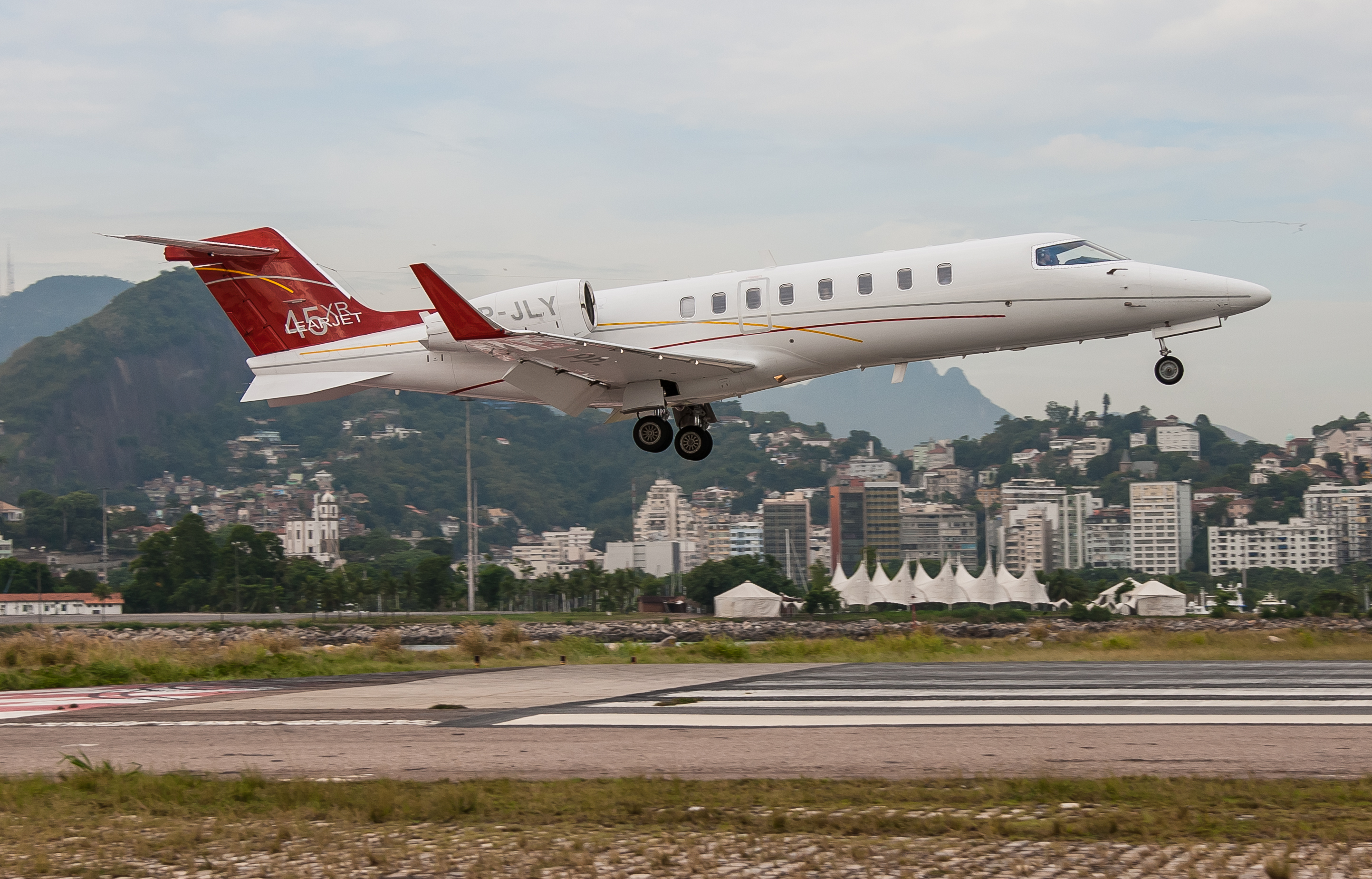 Learjet 45